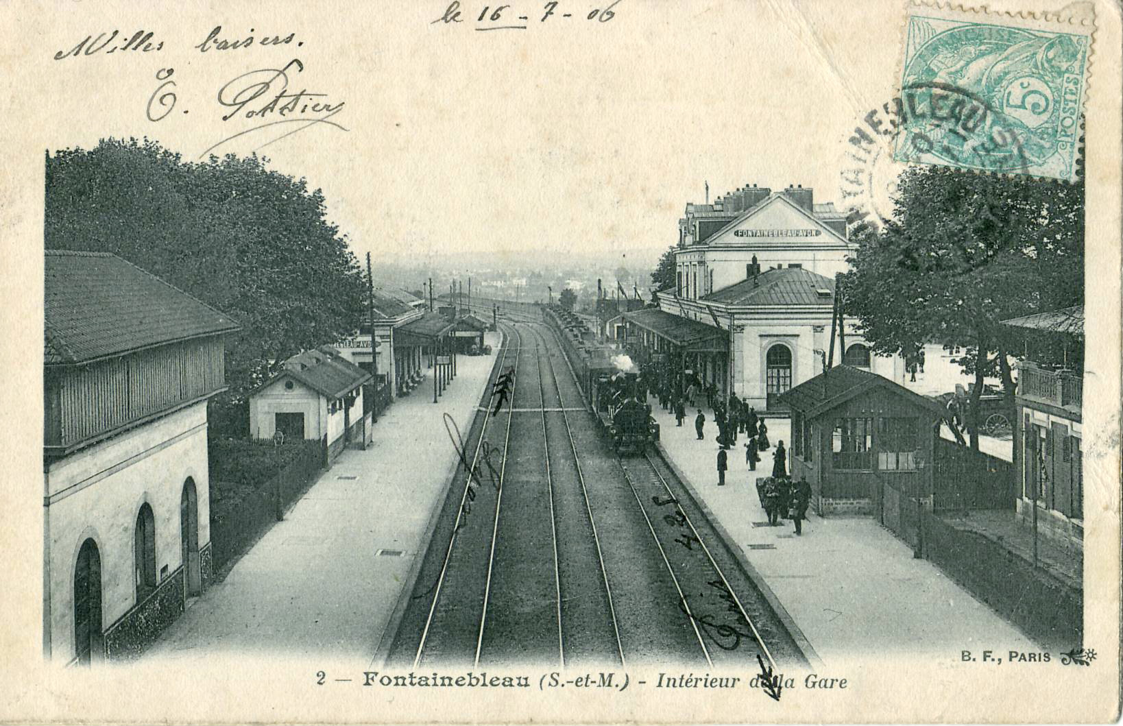 Carte postale ancienne éditée par BF à Paris, n°1 : FONTAINEBLEAU - Intérieur de la Gare